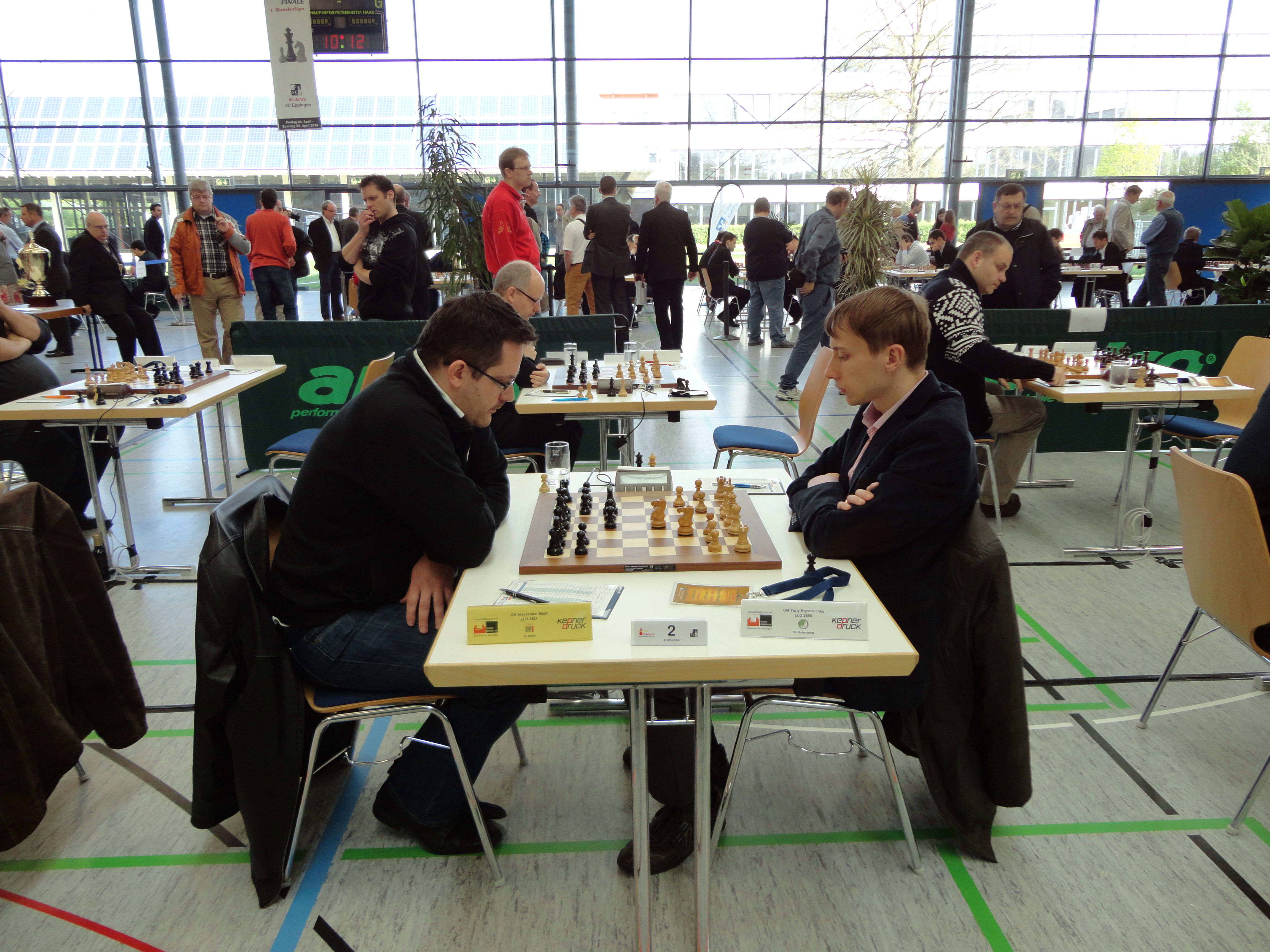 Im Vordergrund: Yuriy Kryvoruchko - Aleksander Mista (links), Finale der Deutschen Schachbundesliga Saison 2013/2014 in der Hardwaldhalle Eppingen.